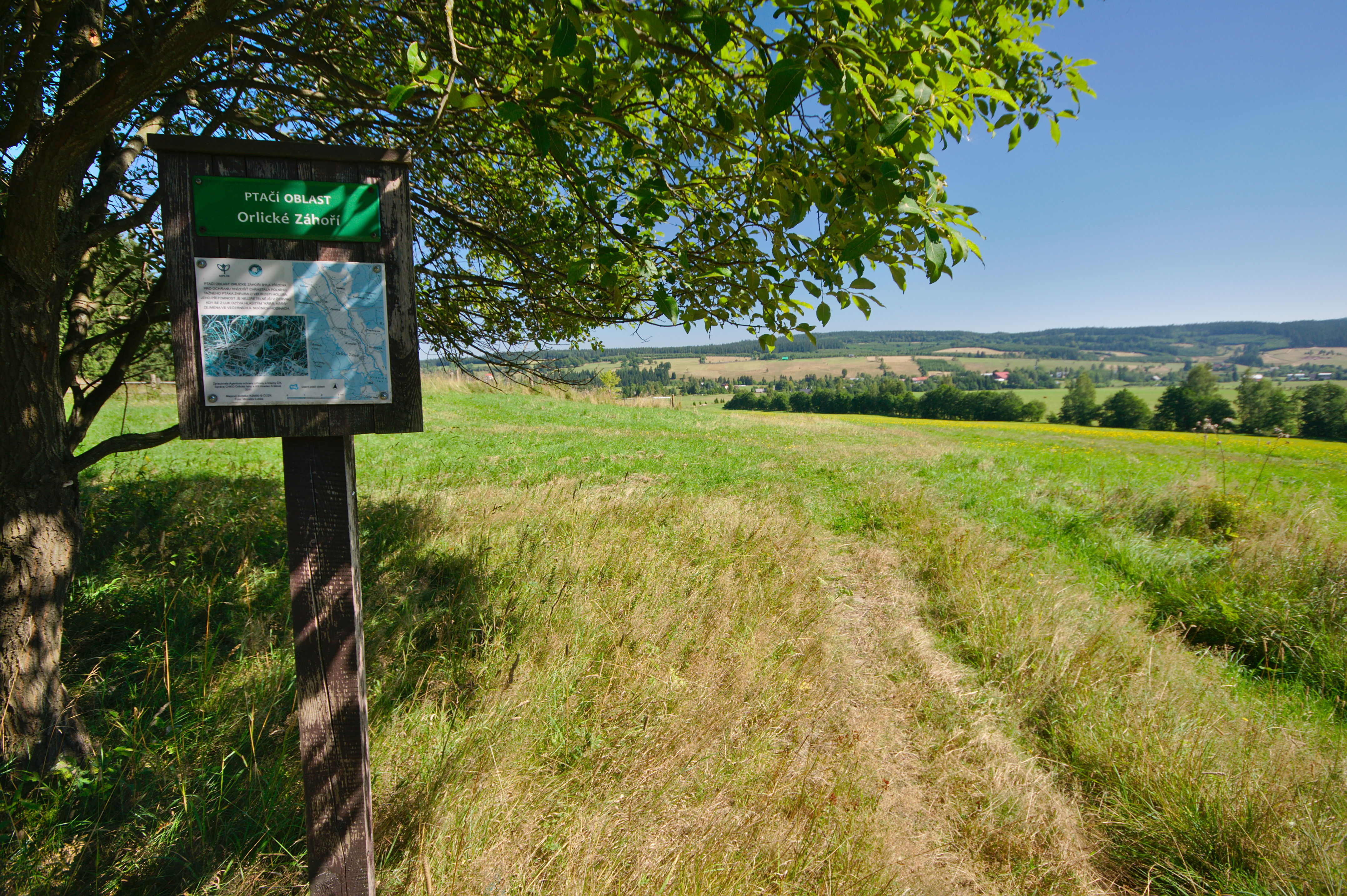 Ptačí oblast Orlické Záhoří, okres Rychnov nad Kněžnou